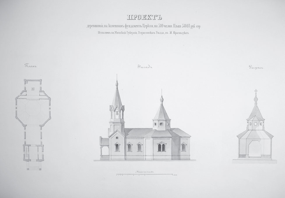 Беларуская (тарашкевіца): Красналукі (Krasnałuki). Царква-мураўёўка